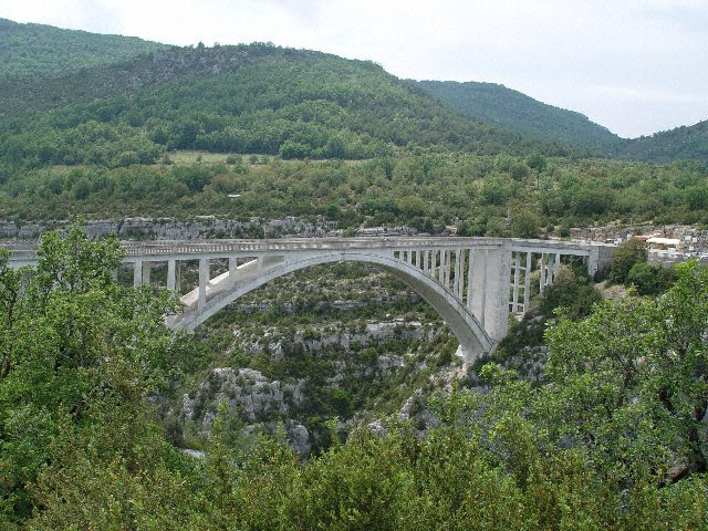 Le Pont de Chaulière. Photo prise le 16 juin 2004 à 14h26